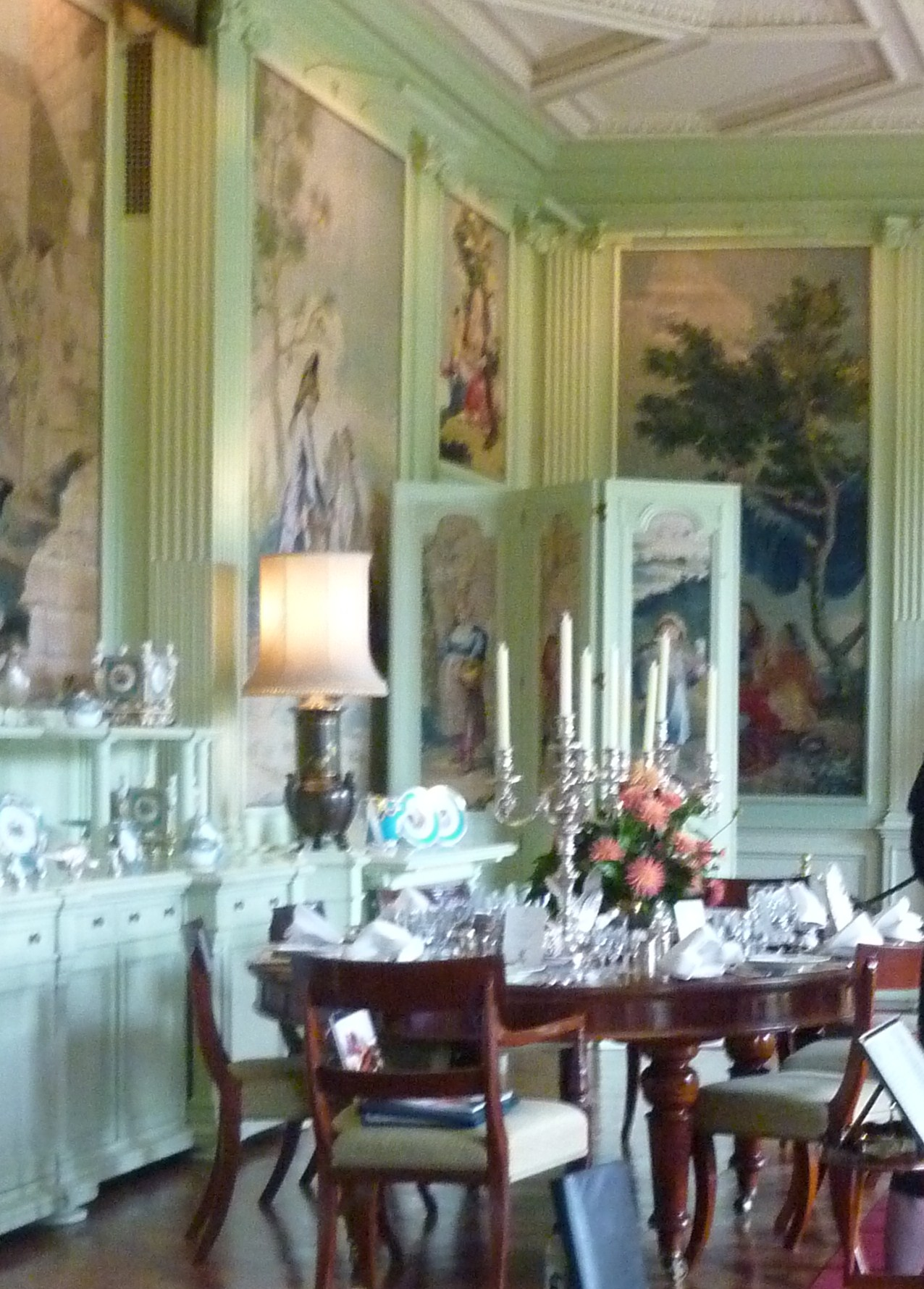 Sandringham eetkamer